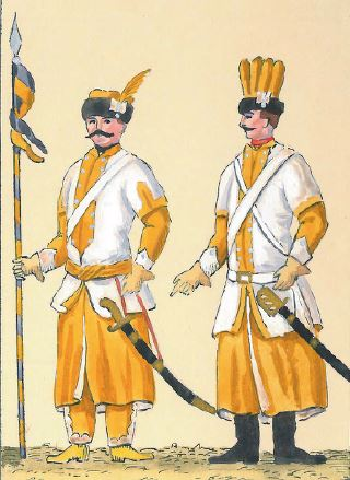 62. Ułan i pocztowy 5 Pułku Ułanów Baranowskiego